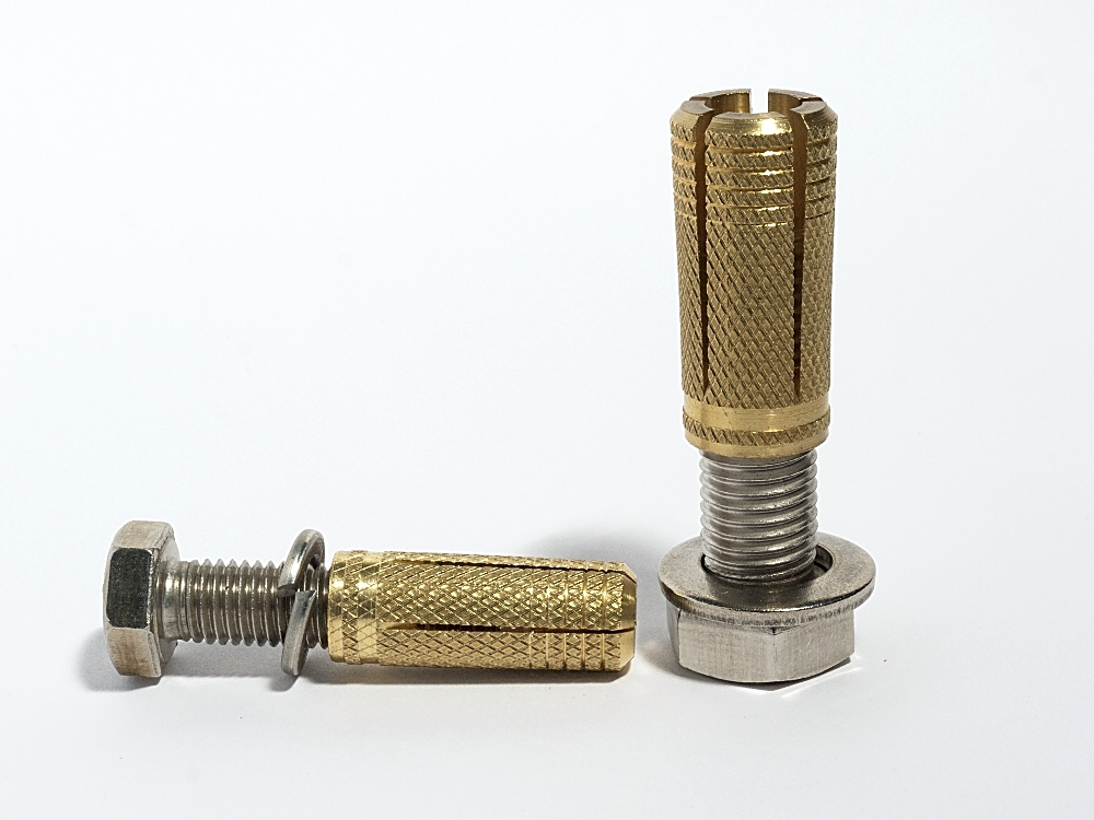 Zwei Betonanker mit Schrauben.